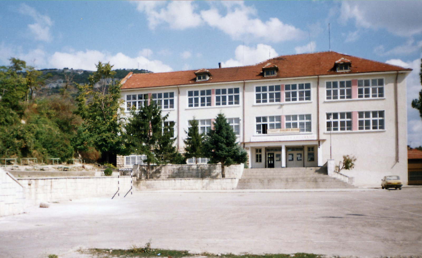 Училище "Панайот Волов", кв. Дивдядово, Шумен